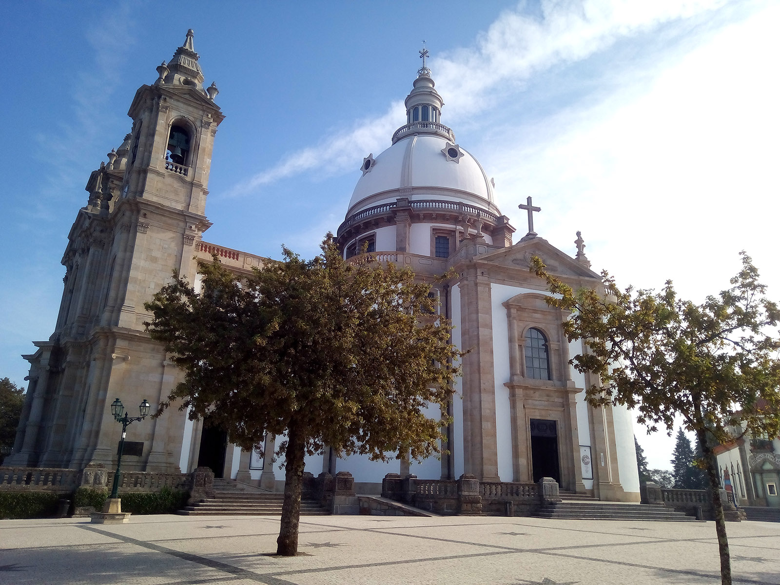 Braga, chiesa di Sameiro